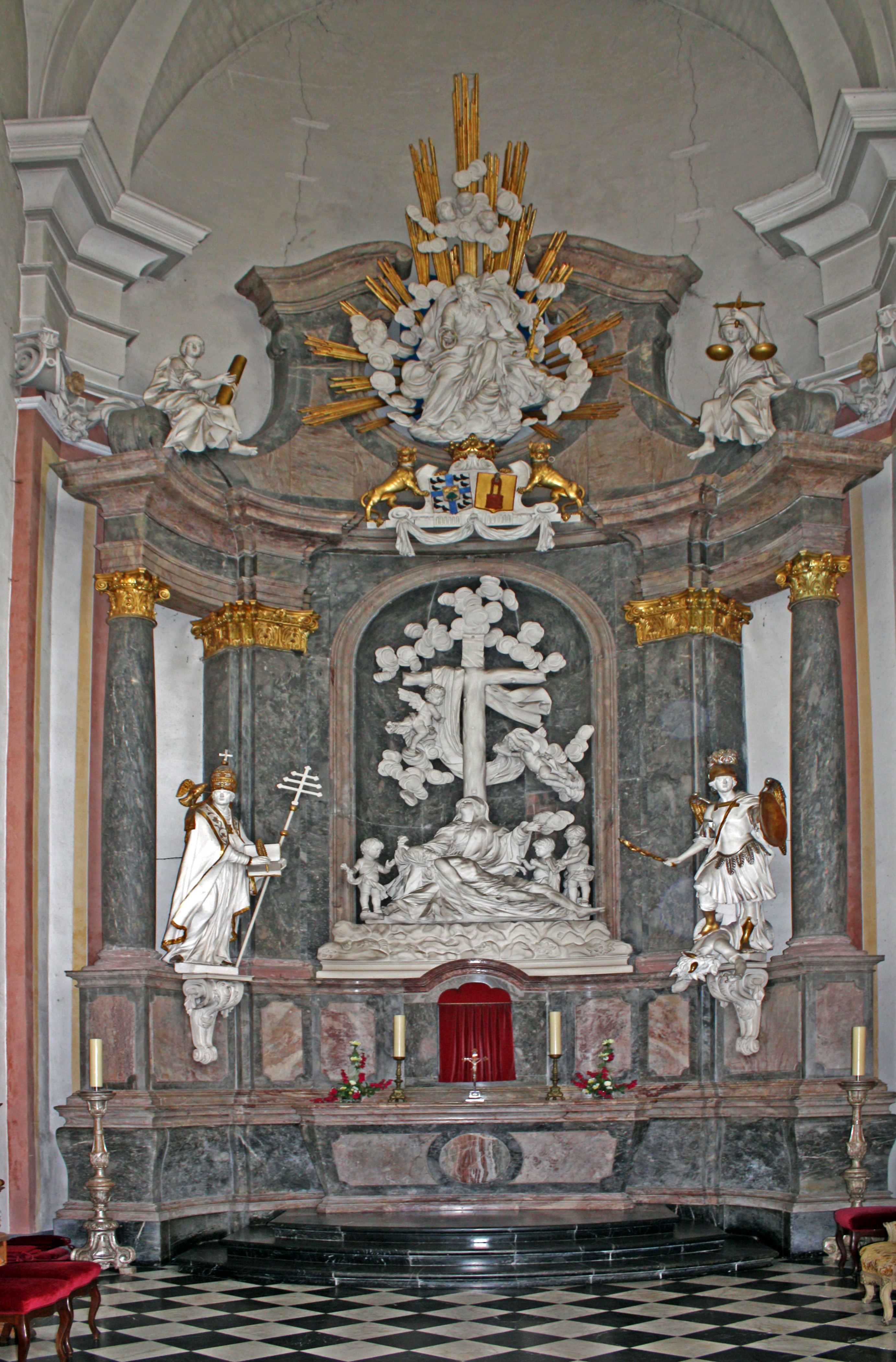 Sankt Gregorius im Elend Köln, Hochaltar